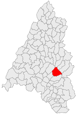 Categorie:Hărţi ale judeţului Bihor